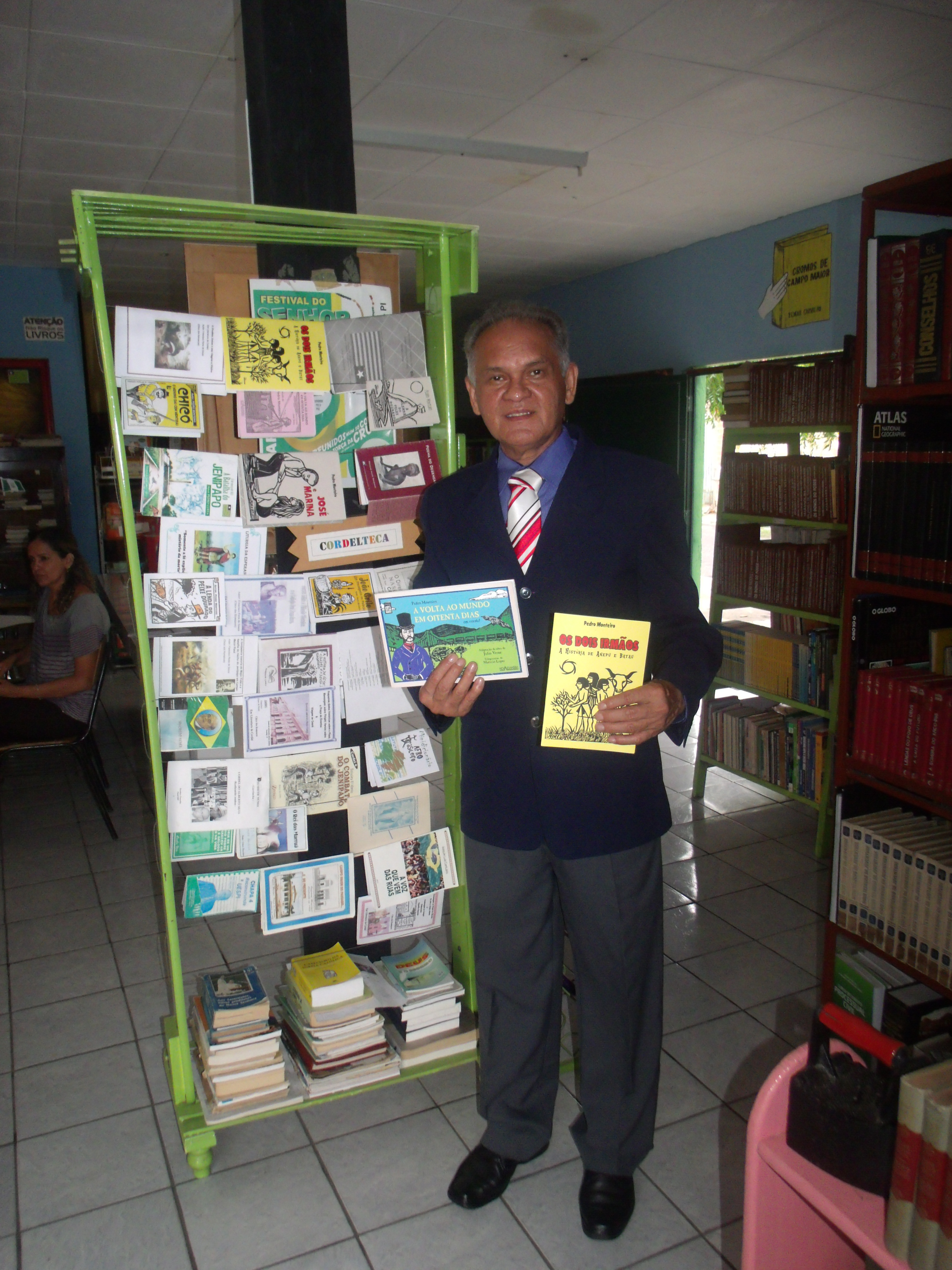 Pedro Monteiro na Cordelteca.